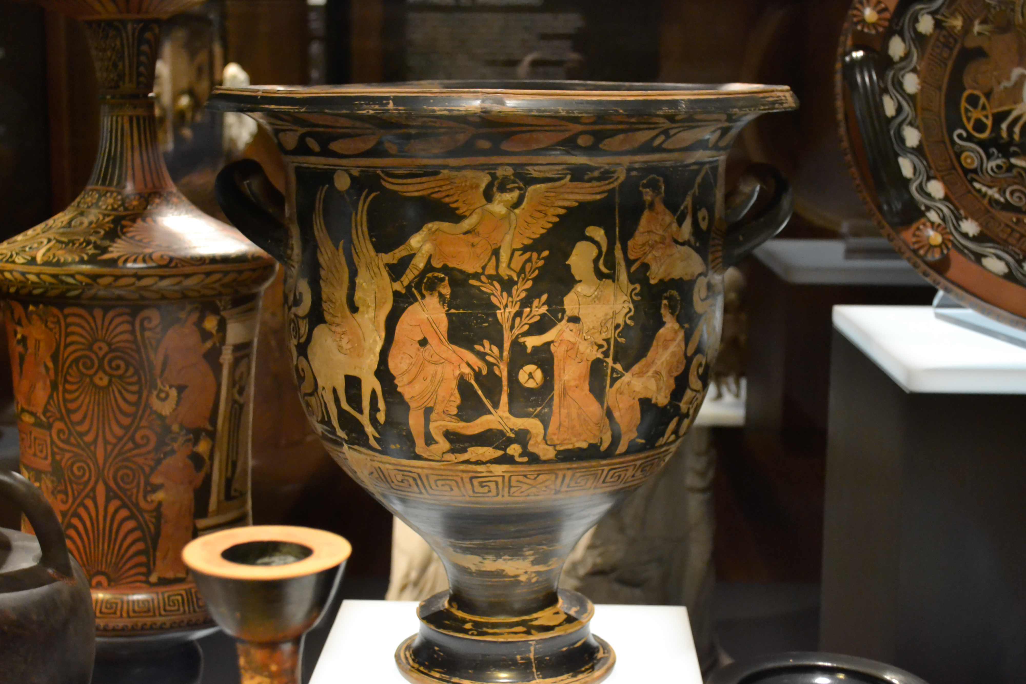 Cara A de crátera con escena en la que Poseidón y Atenea rivalizan por la posesión de Atenas. Grupo de Nápoles 3227. Altura: 53 cm; diámetro máximo: 51,50 cm. 360-320 a. C. Nº Inv. 11095. Museo Arqueológico Nacional de España.